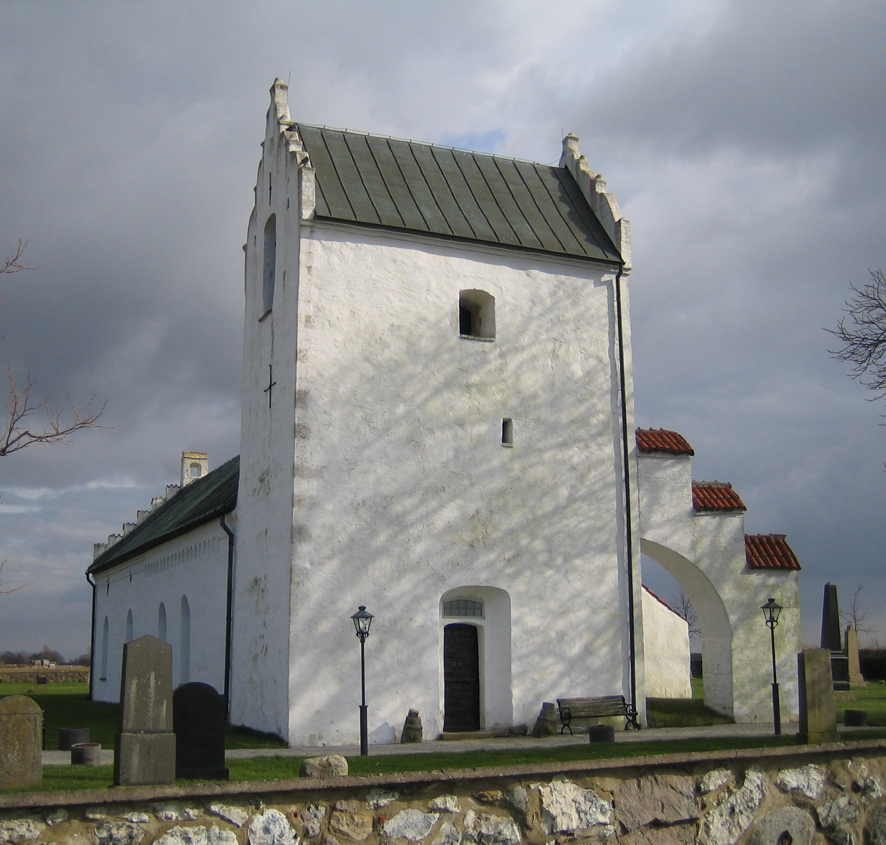 Stora Hammars kyrka, Skåne, Sweden